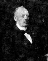 Franz von Schwartz (* 18. Januar 1839 in Münster; † 28. März 1907 in Konstanz) im Regierungspräsident Hohenzollernschen Land